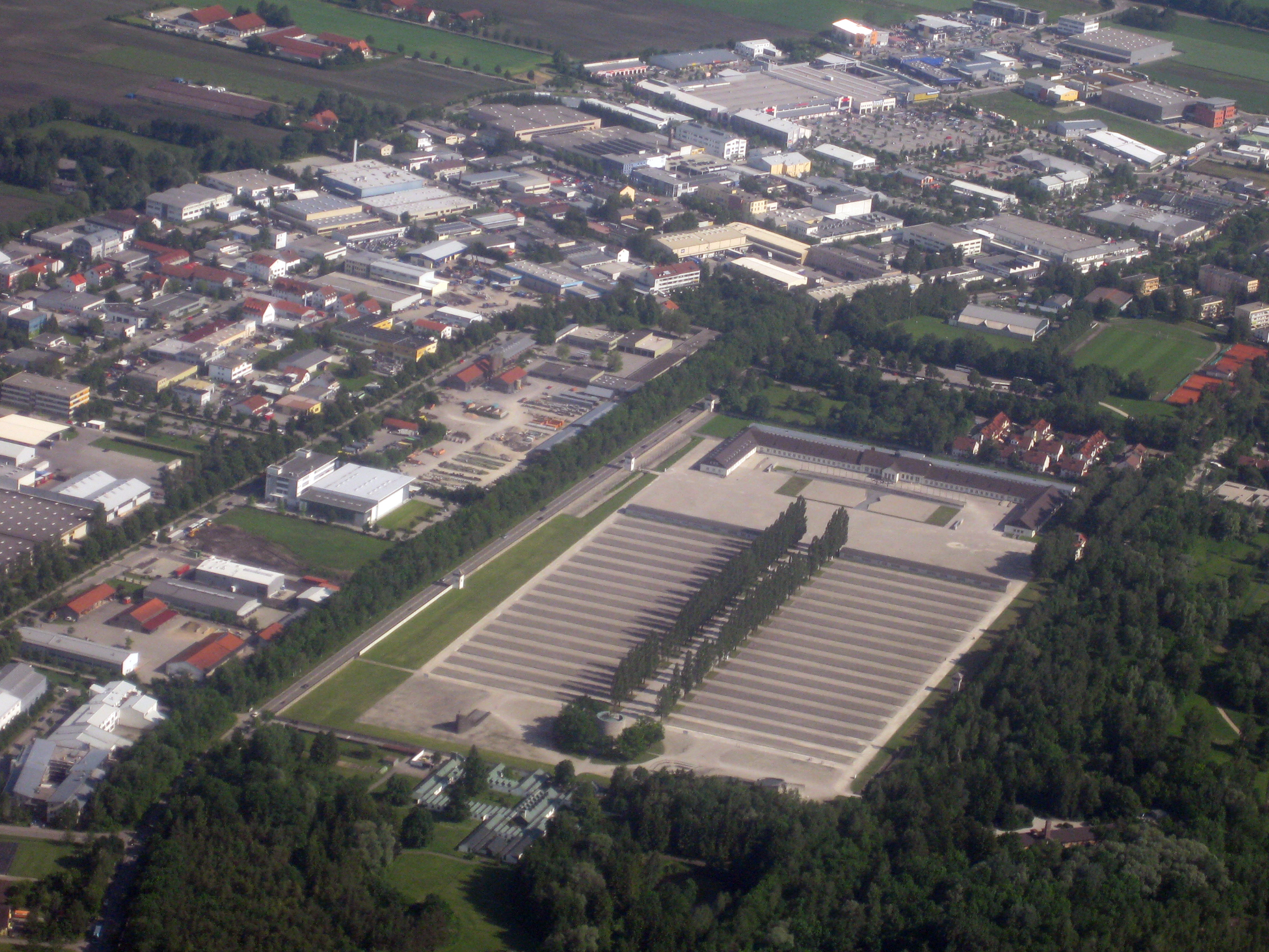 KZ Gedenkstätte Dachau, städtebauliche Lage heute